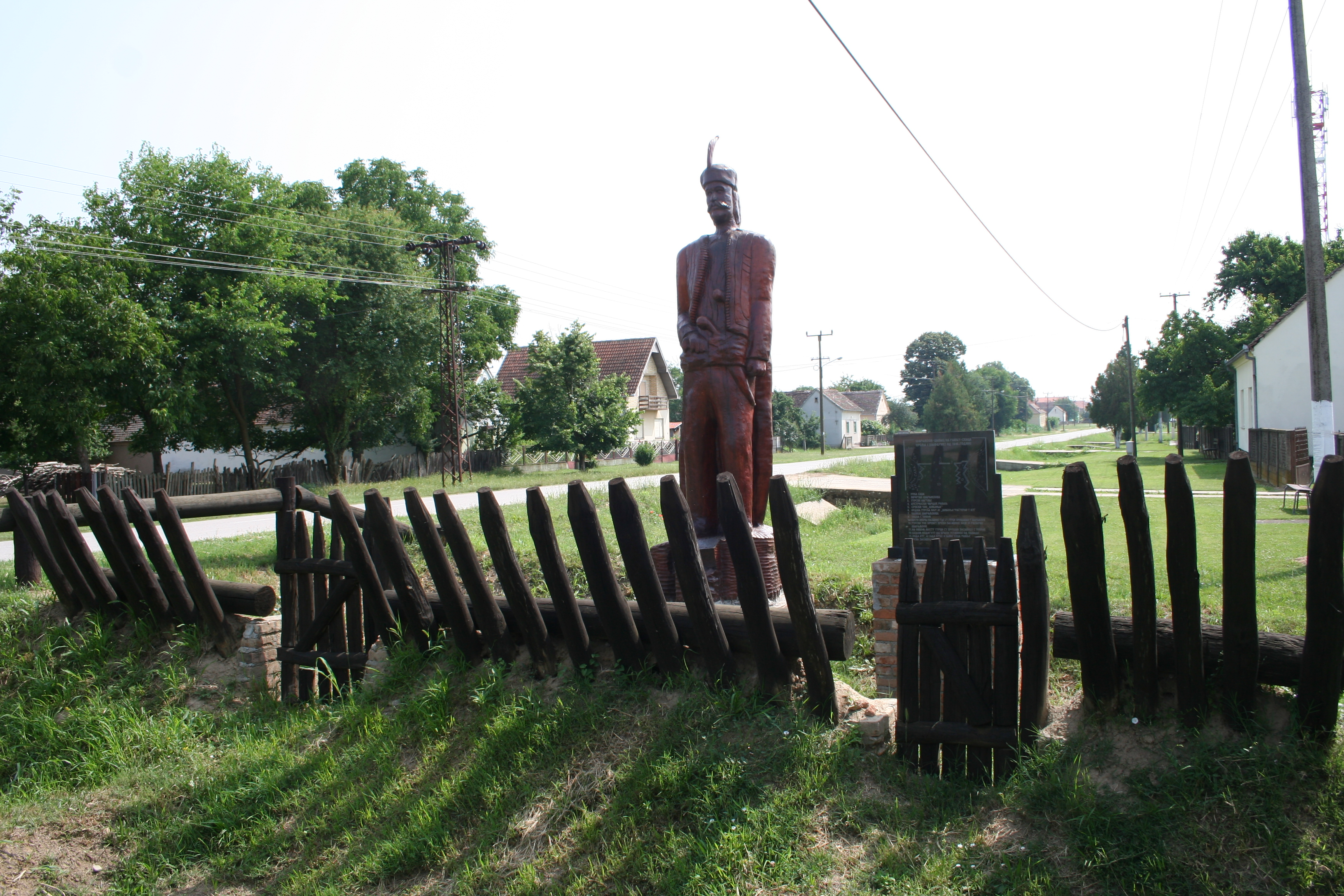 Predstava šanca iz "Boja na Ravnju", sa skulpturom Zeke Buljubaše u drvetu, Ravnje